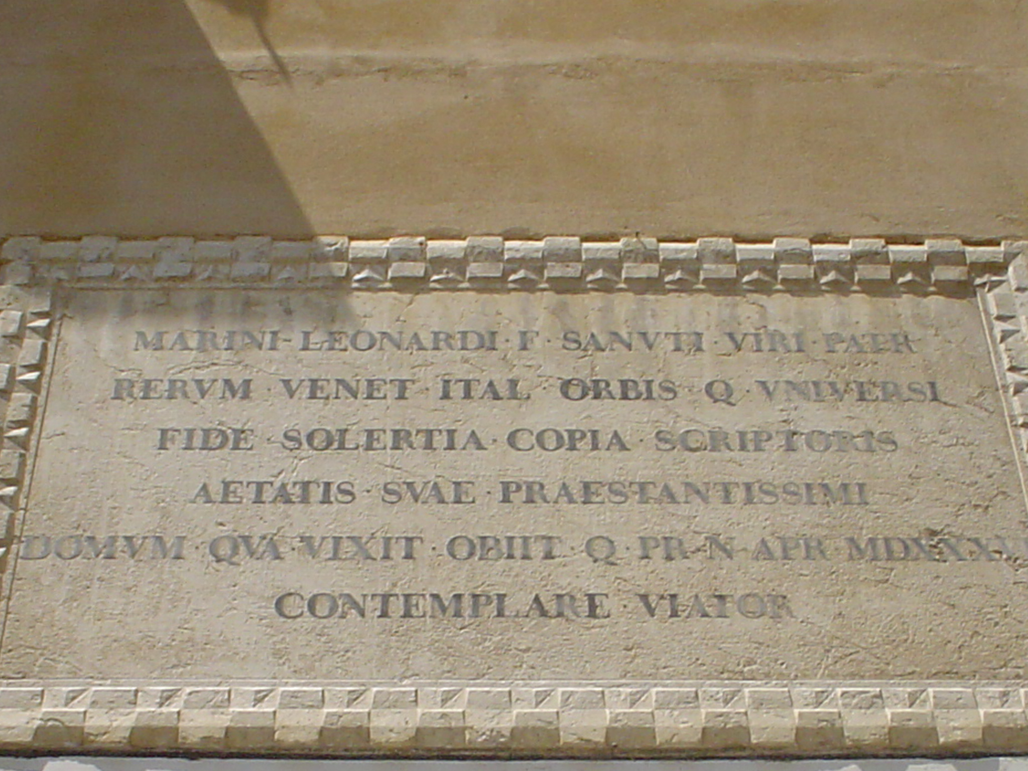 Lapide a Venezia in memoria di Marin Sanudo "il vecchio".